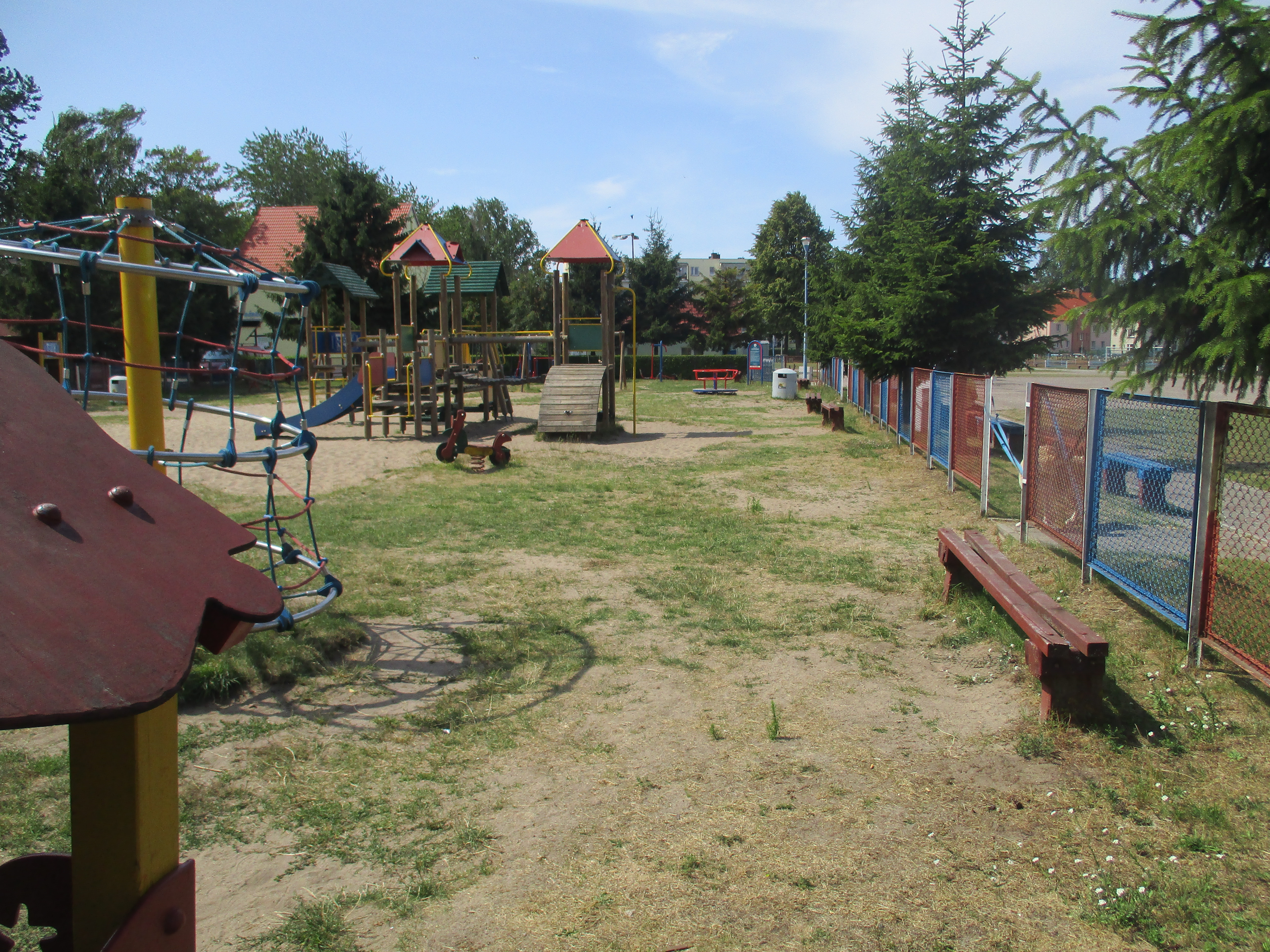 Ustka; OSiR- plac zabaw dla dzieci